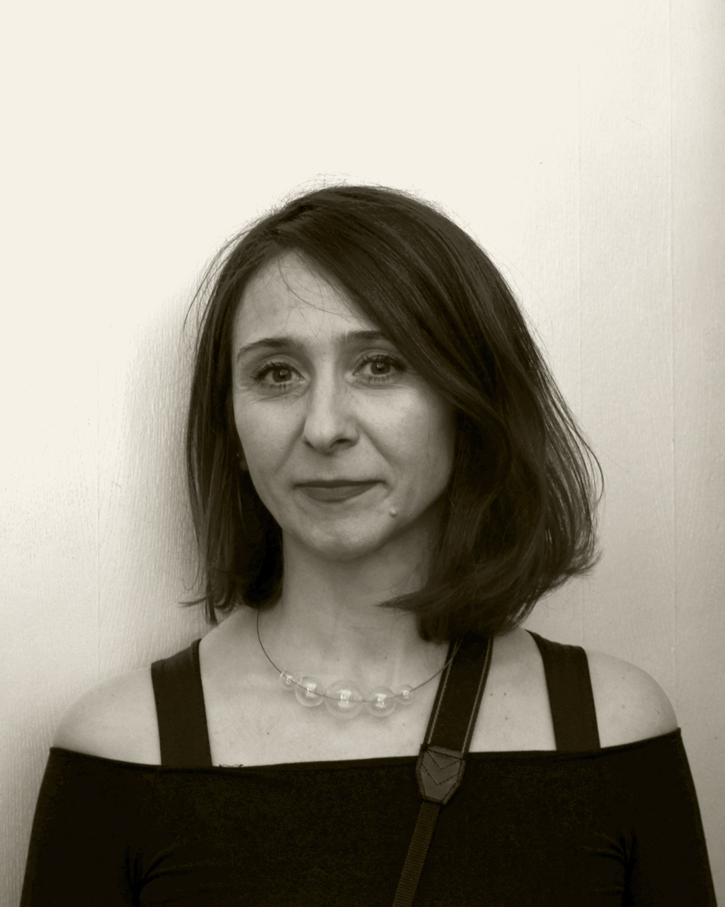 Nadia Rovderová (2017)